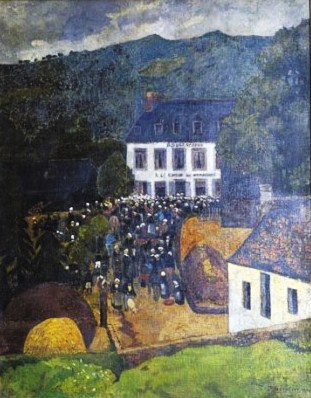 La foire à Châteauneuf-du-Faou par le peintre français Paul Sérusier